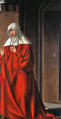 Volante direito do Tríptico da Capela dos Reis Magos da Igreja da Ribeira Brava Reverso: Santa Isabel Amverso: Adoração dos Reis Magos